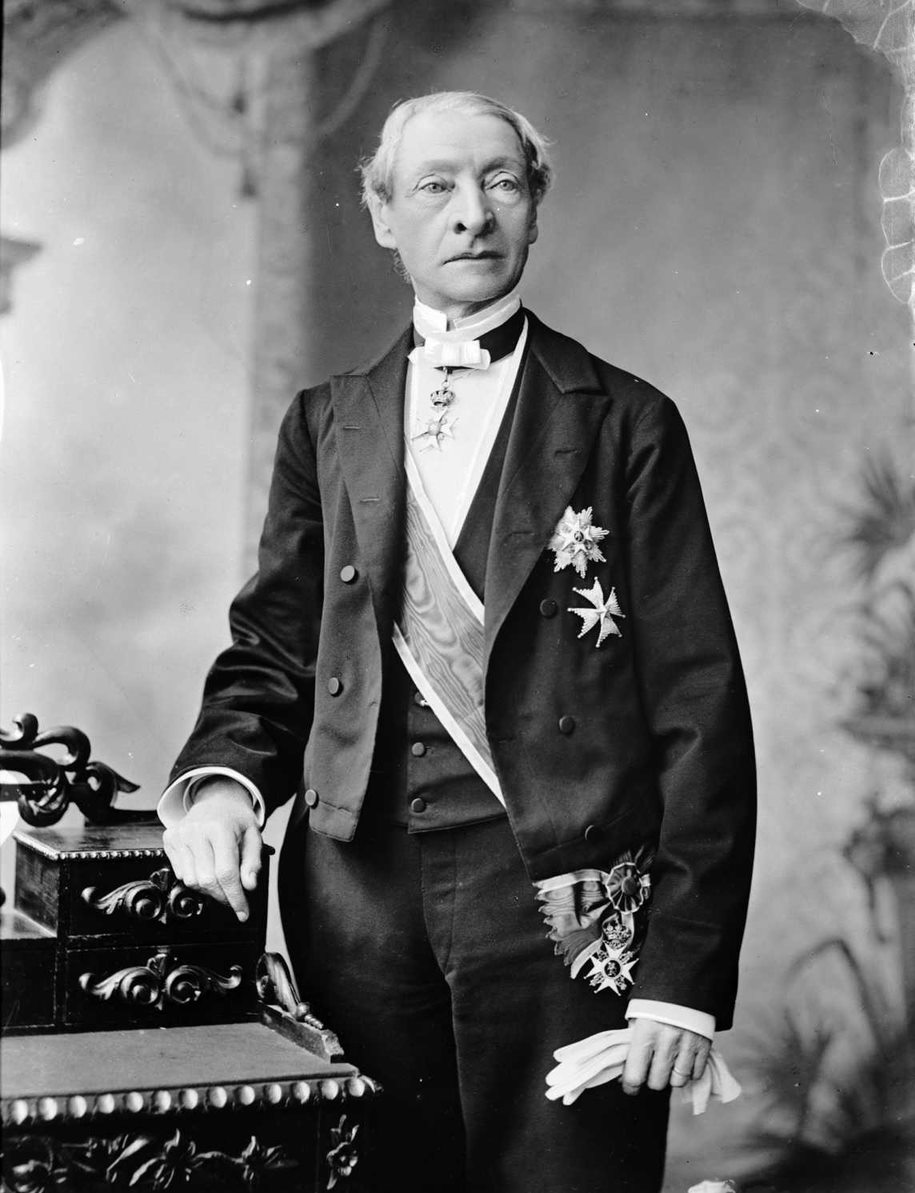 Anders Sandøe Ørsted Bull, norsk embetsmann og statsråd.